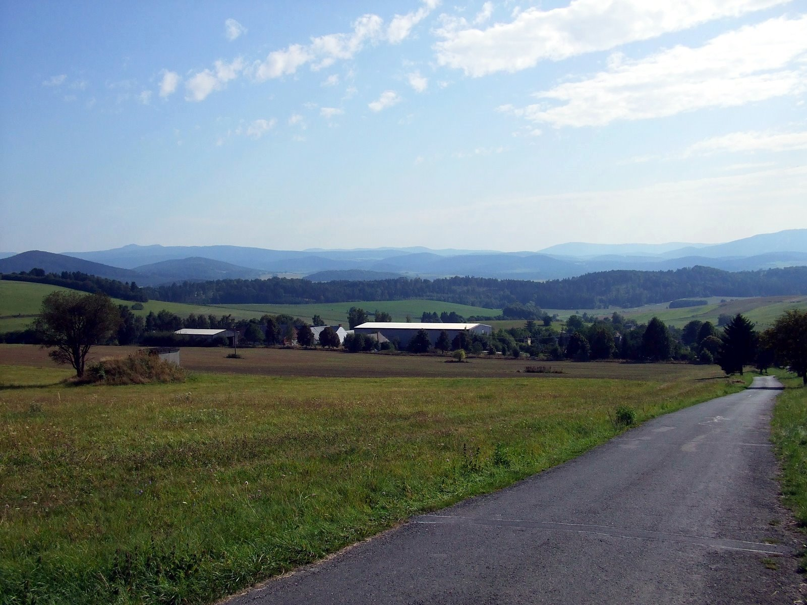 pohled od Nové Vsi na Šumavu